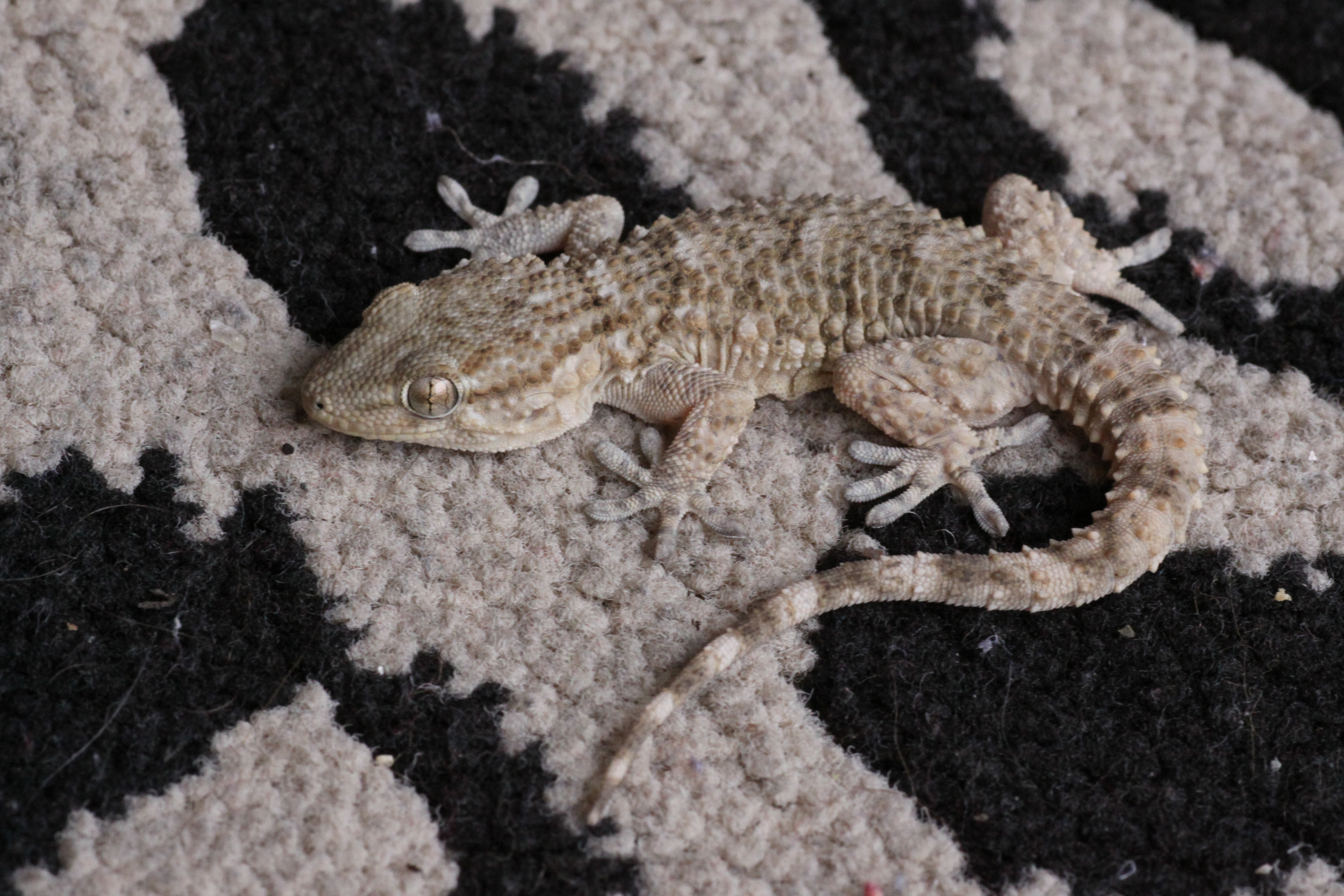 Gekon murowy (Tarentola mauritanica)